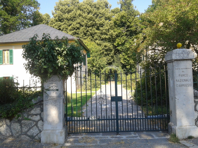 Sede dell'ente Parco Nazionale d'Abruzzo, Lazio e Molise